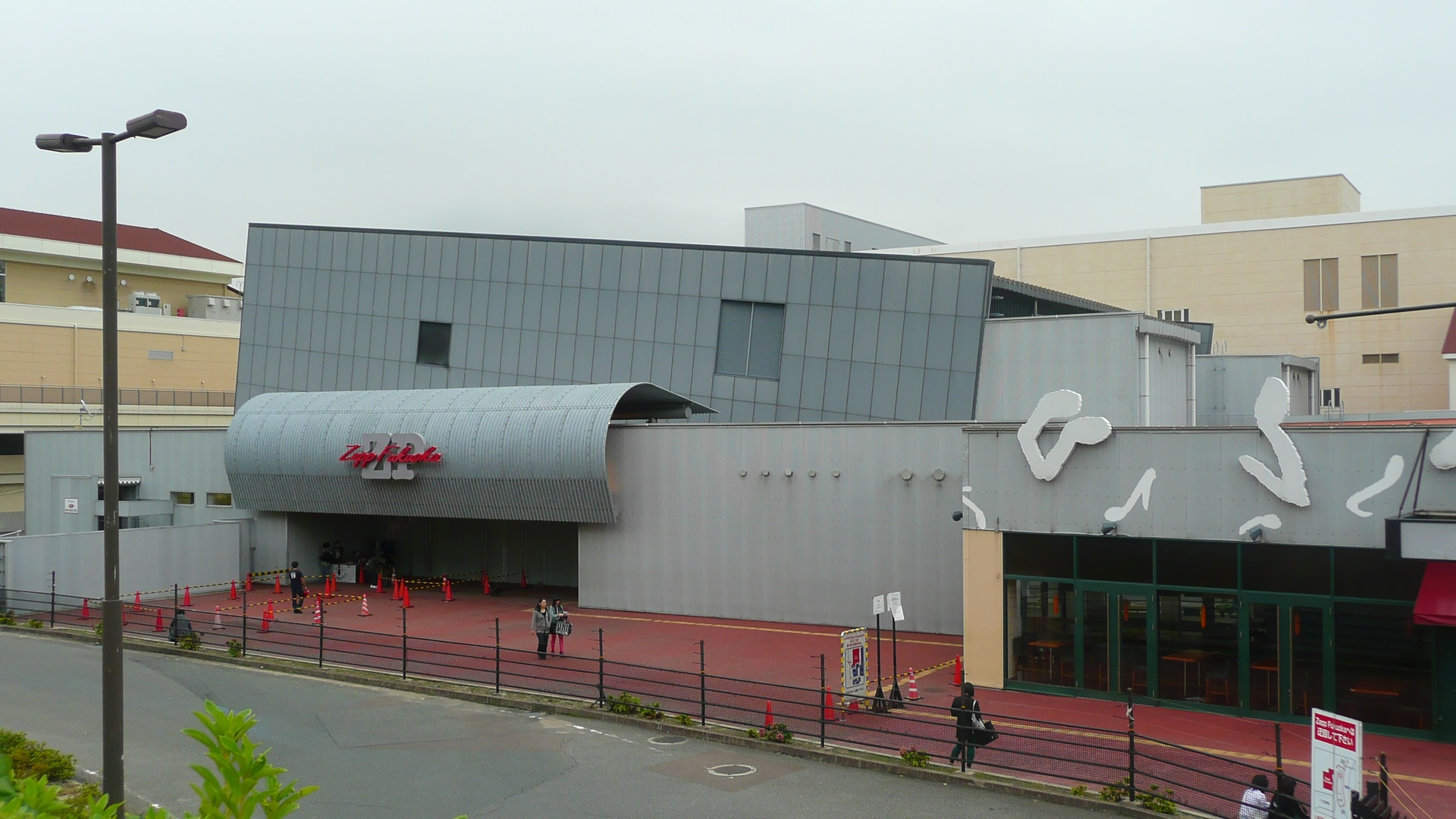 Zepp Fukuoka（ホークスタウンモール内に開設された初代）